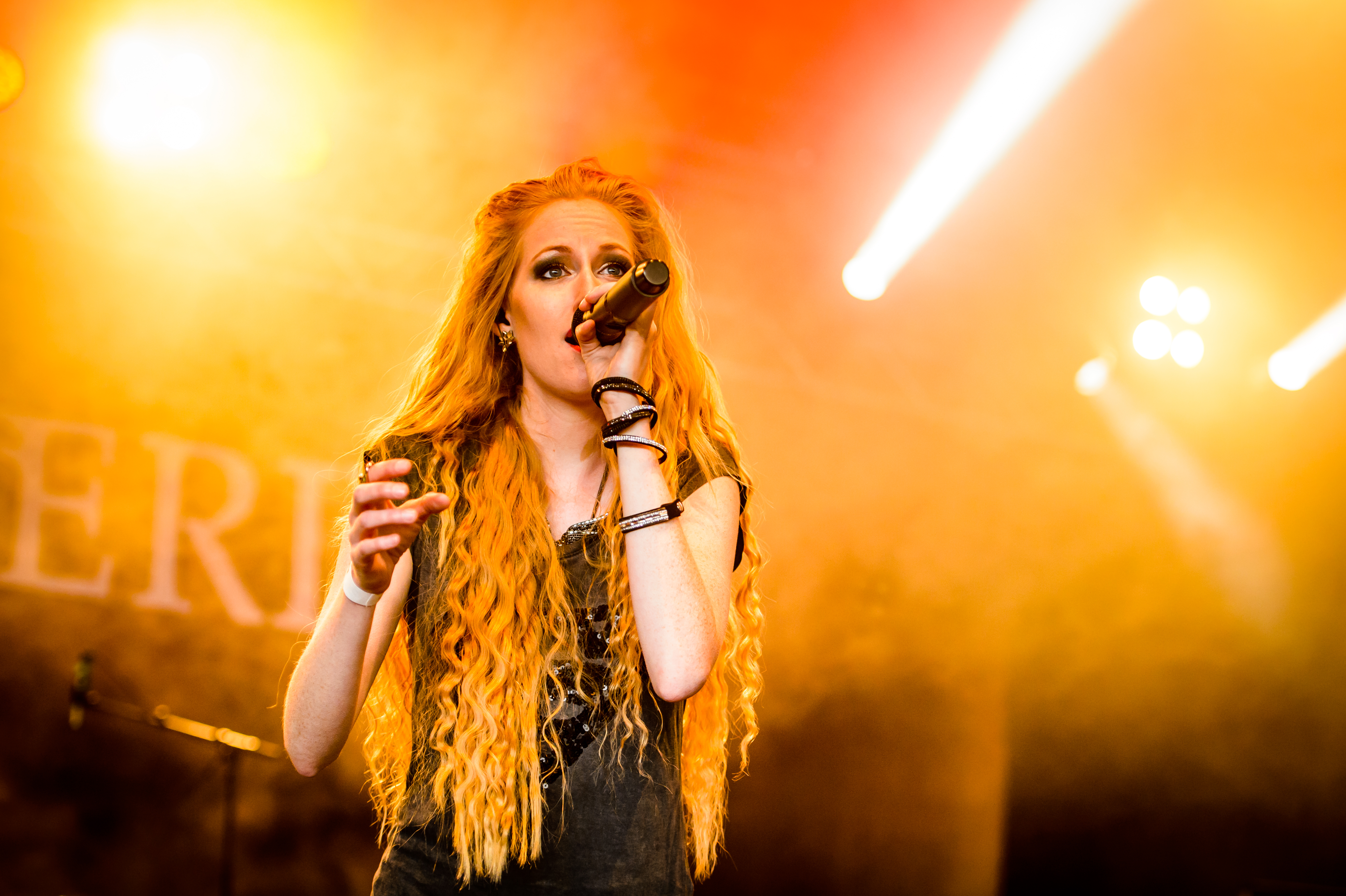 'Dong Open Air 2017; Neukirchen-Vluyn': 'Aeverium'